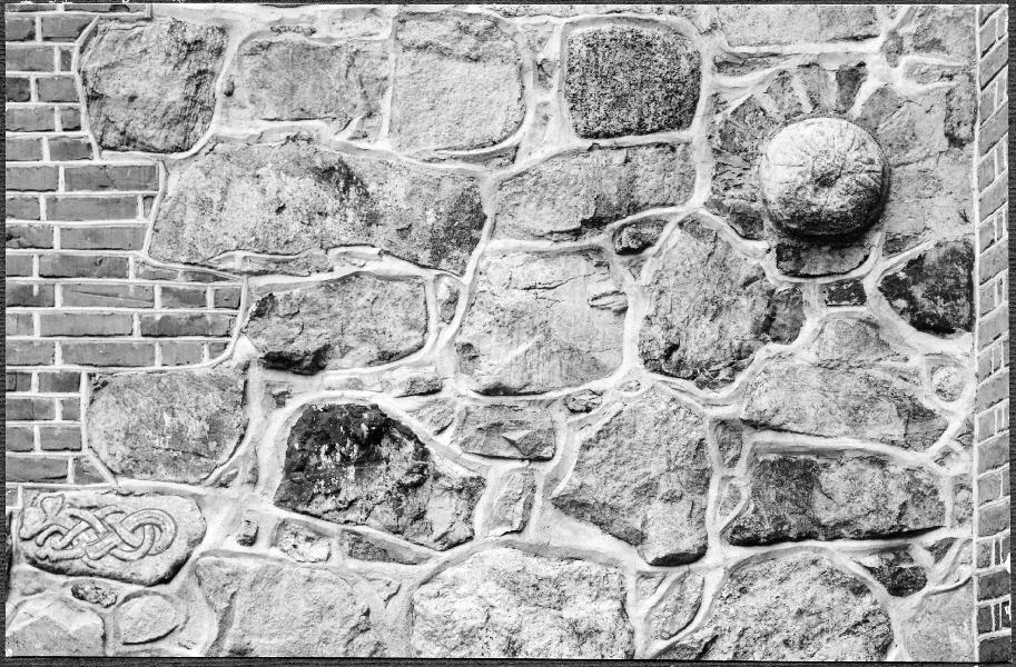 Inmurad sten med drakslingor och klotsten i gavelväggen. Kategori: (01) Exteriörer, detaljerInmurad sten med drakslingor och klotsten i gavelväggen.